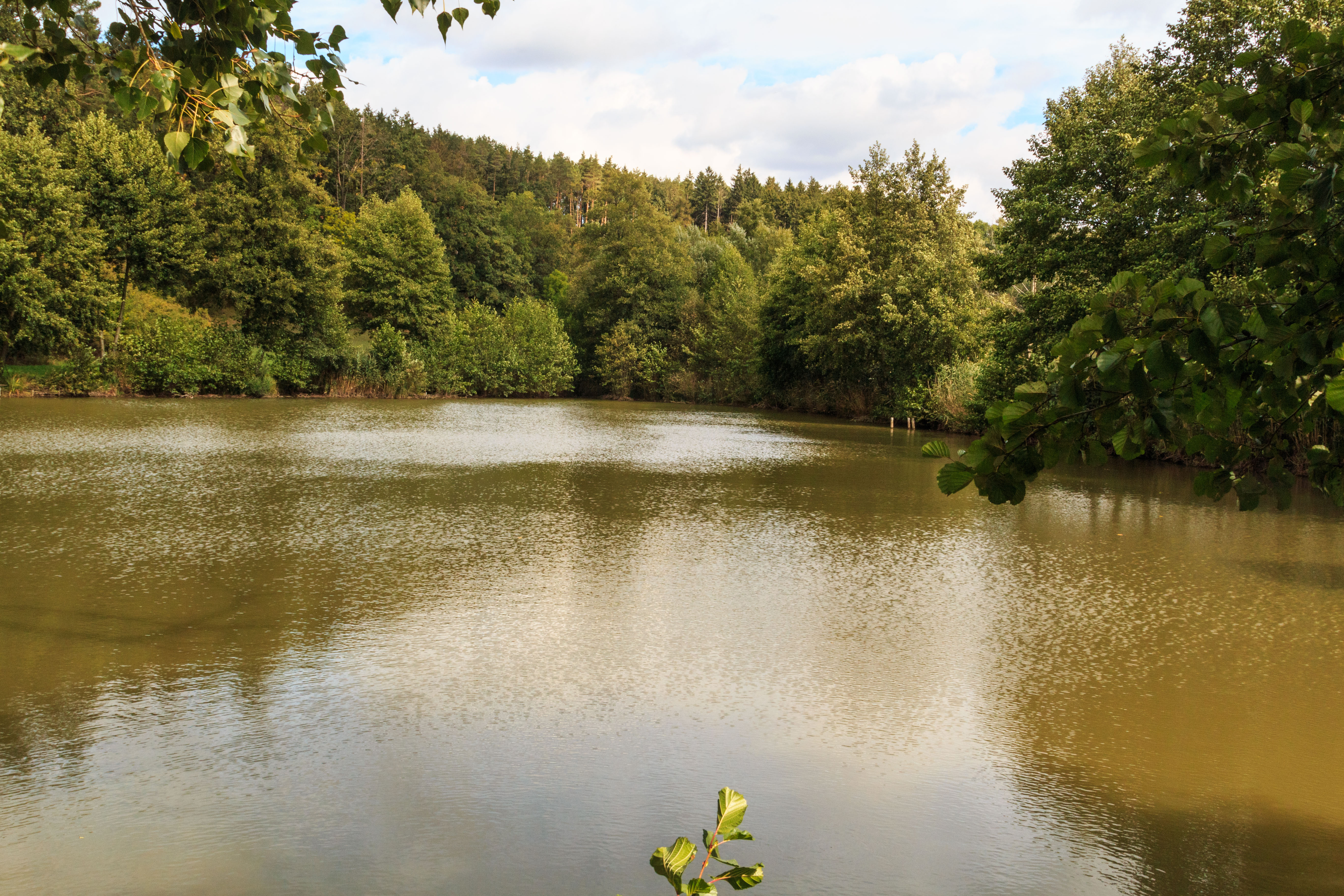 Rybník Švandrlík u Ledské Project: Vodstvo.